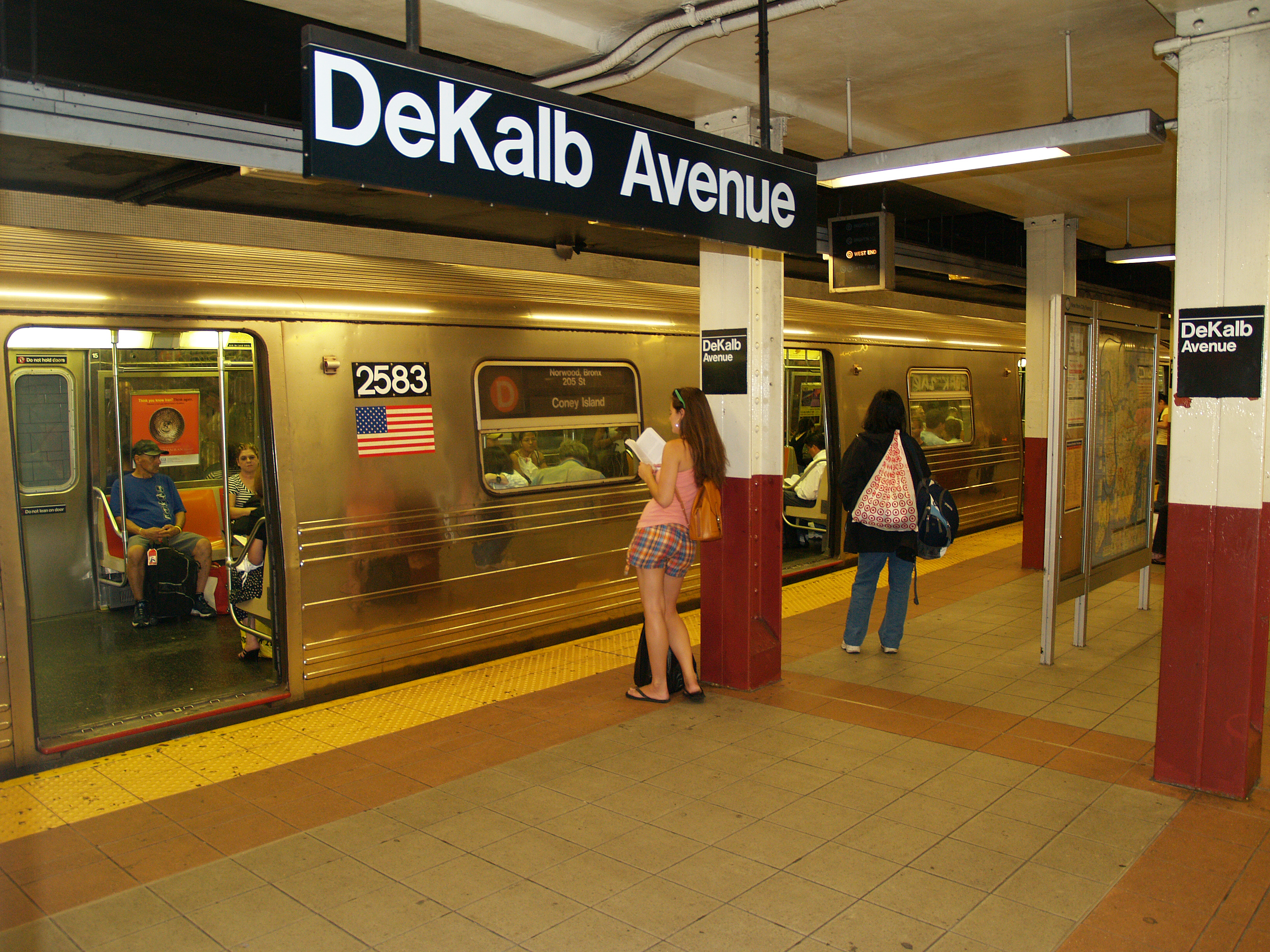 Dekalb Avenue by David Shankbone